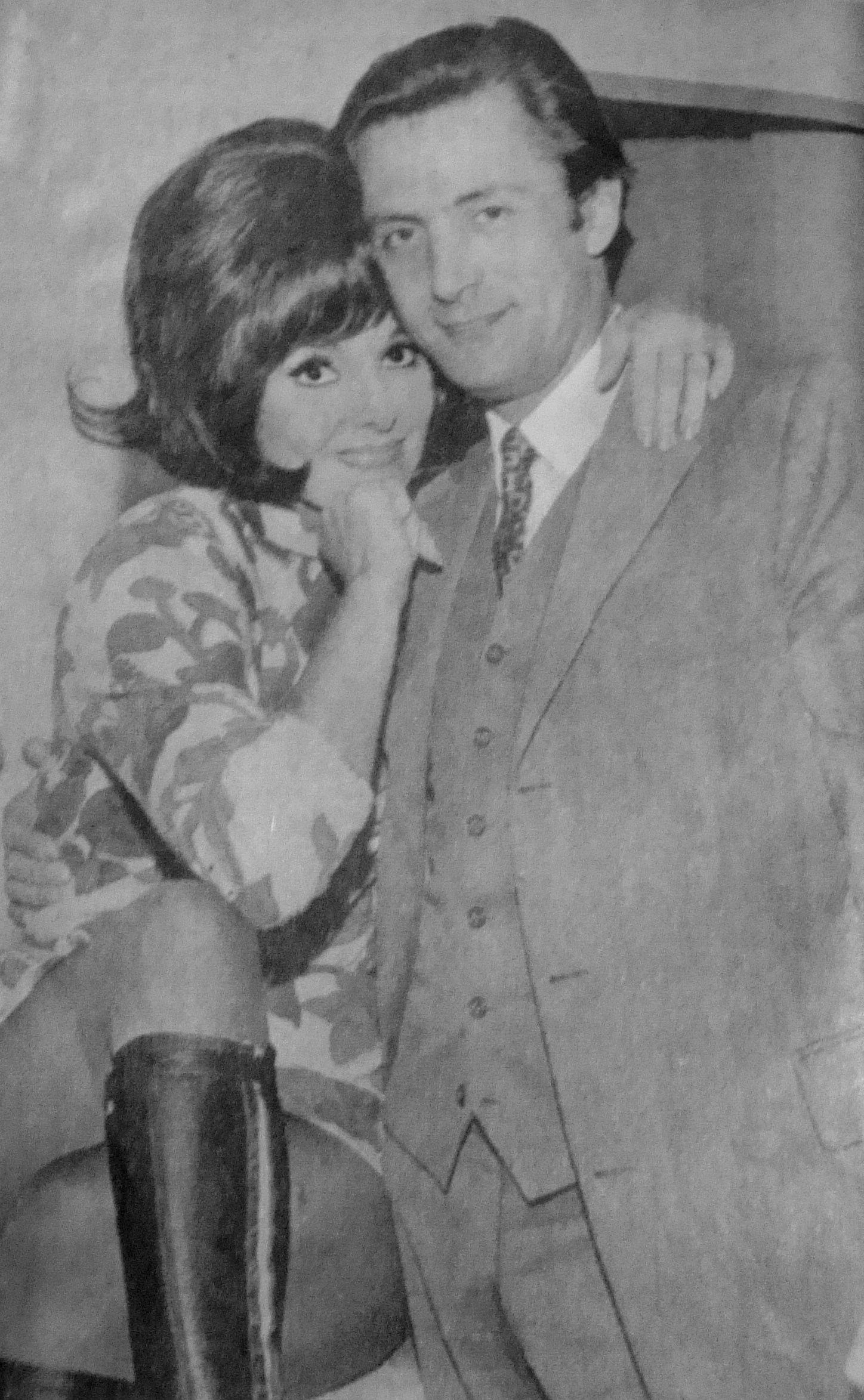 Lucho Avilés junto a su pareja Inés Moreno en 1972.